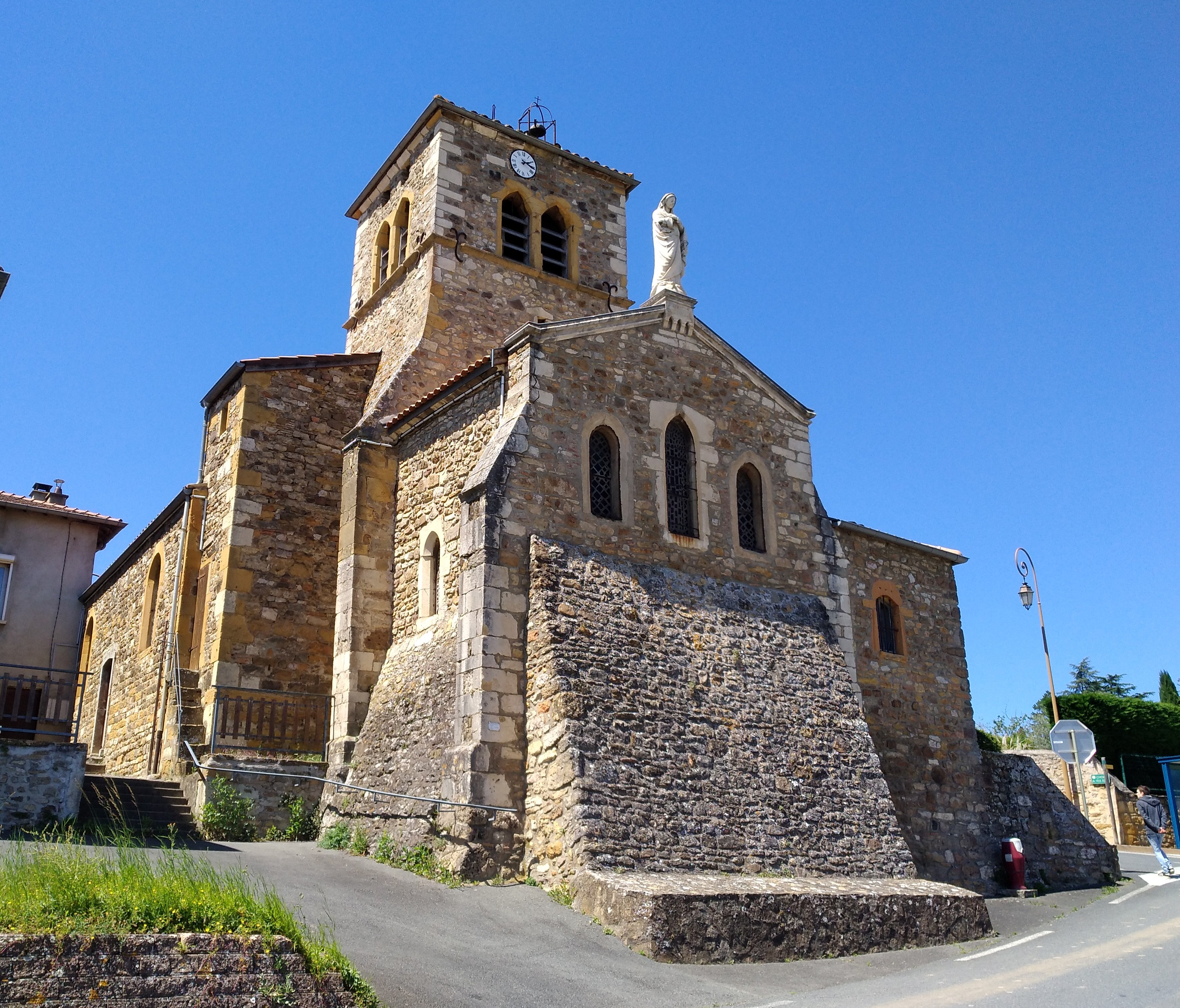 L'église Saint-Maurice de Lozanne, dans le département du Rhône.